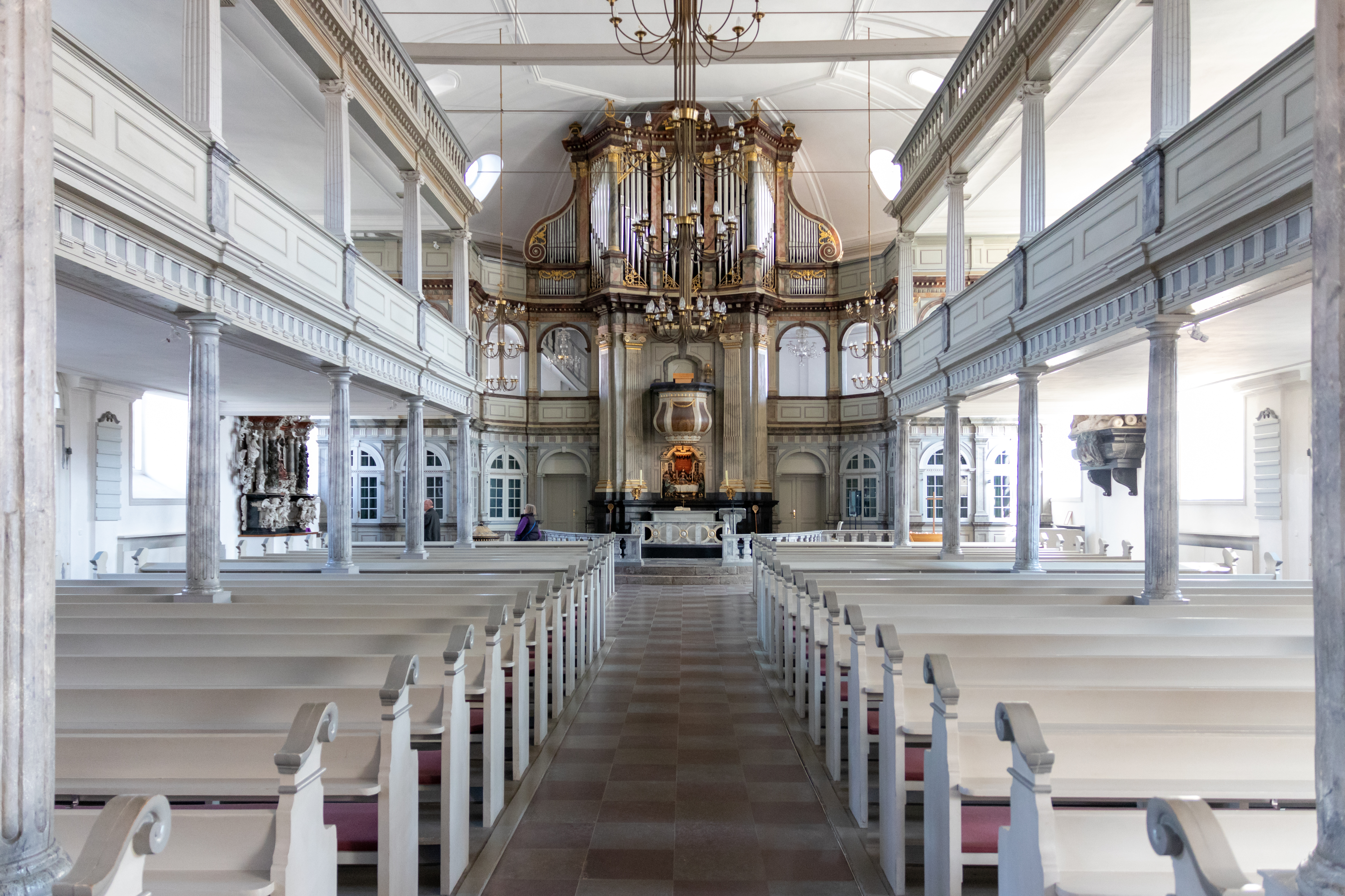 St Nicolai-Kirche (Kappeln), Innenausstattung